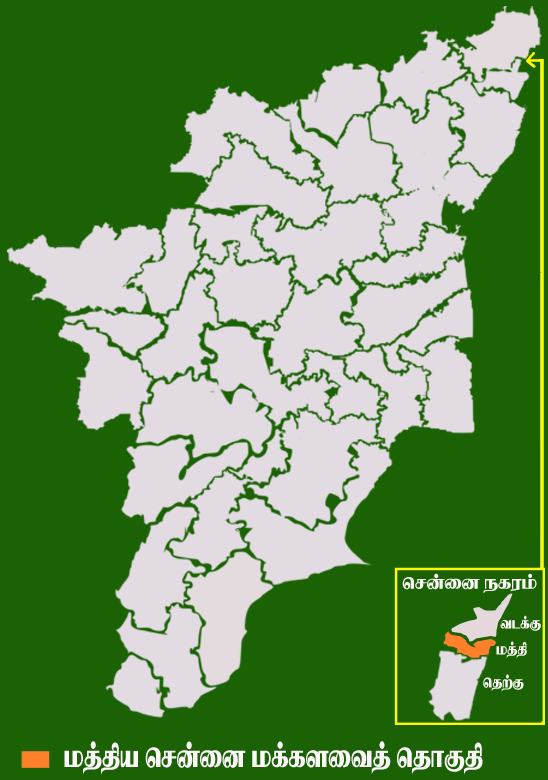 தமிழக வரைபடத்தில் உள்ள மத்திய சென்னை மக்களவைத் தொகுதி